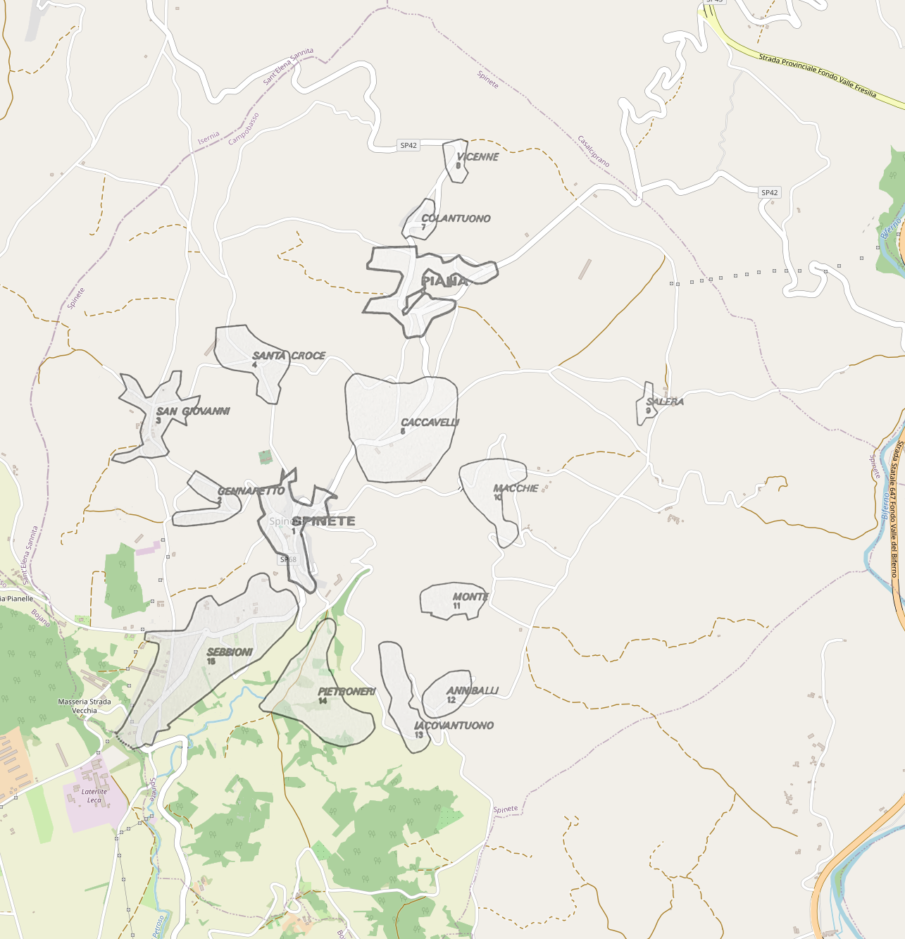 Frazioni del comune di Spinete (CB)